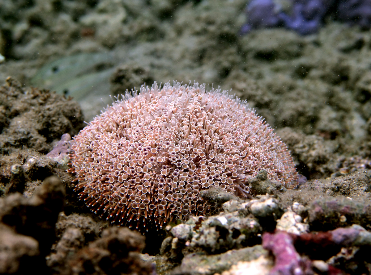 Le dangereux oursin-fleur (Toxopneustes pileolus) à découvert, débarrassé des protections dont il se camoufle habituellement.